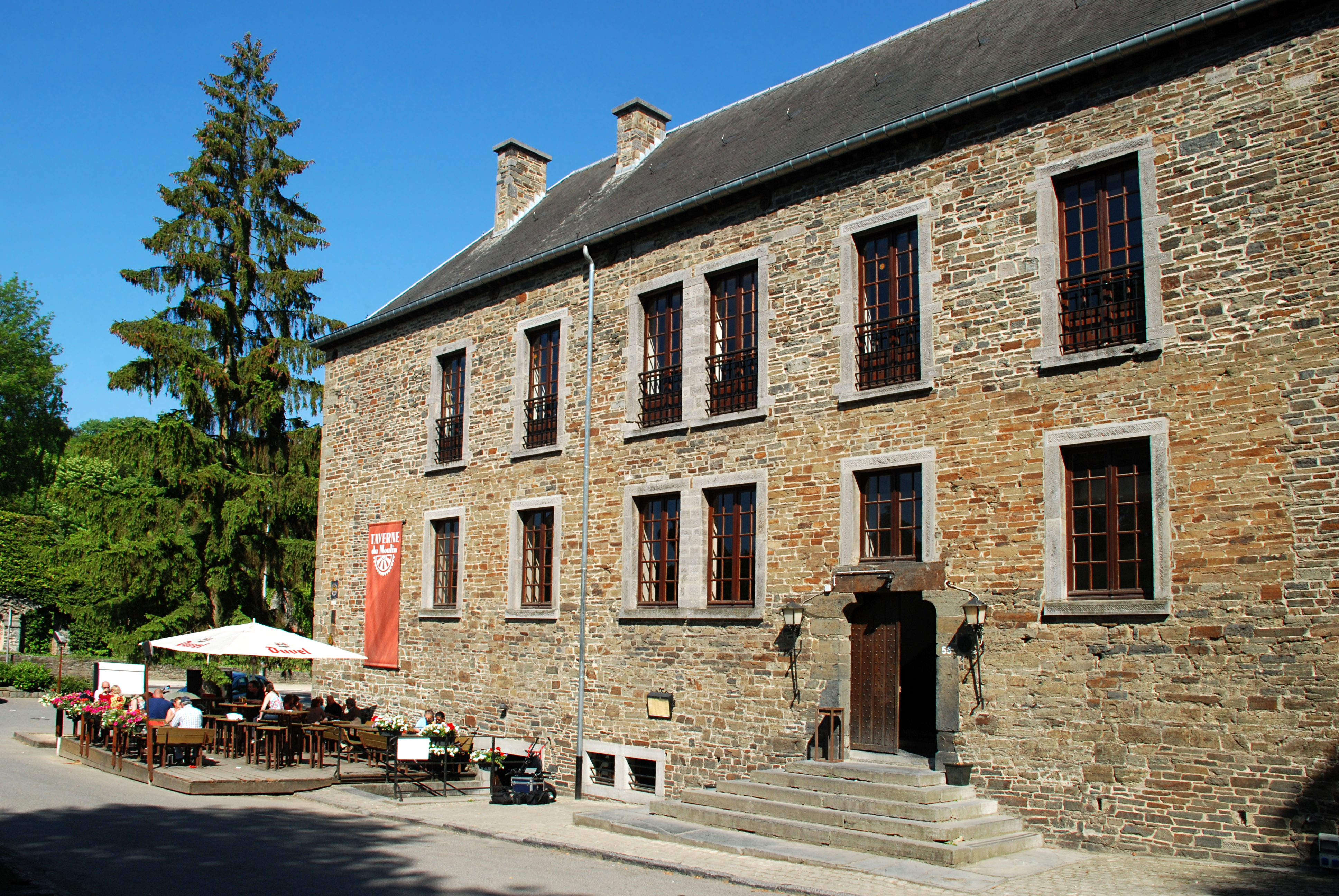 Belgique- Brabant wallon - Villers-la-Ville - ancien moulin abbatial